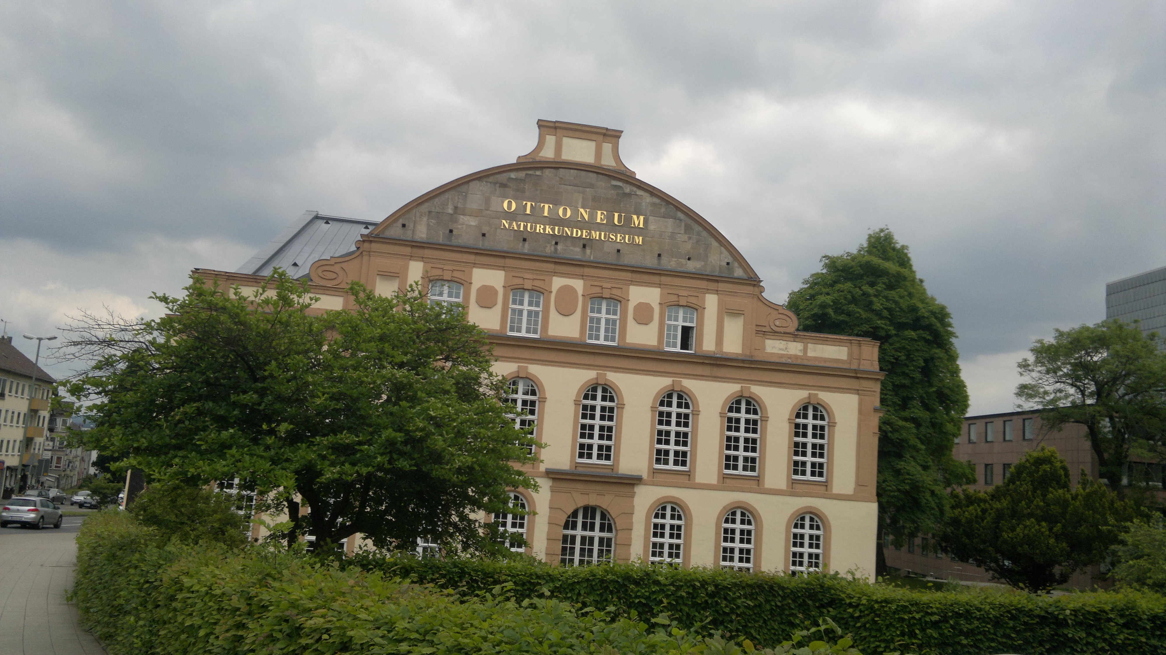 Ottoneum(természettudományi múzeum)